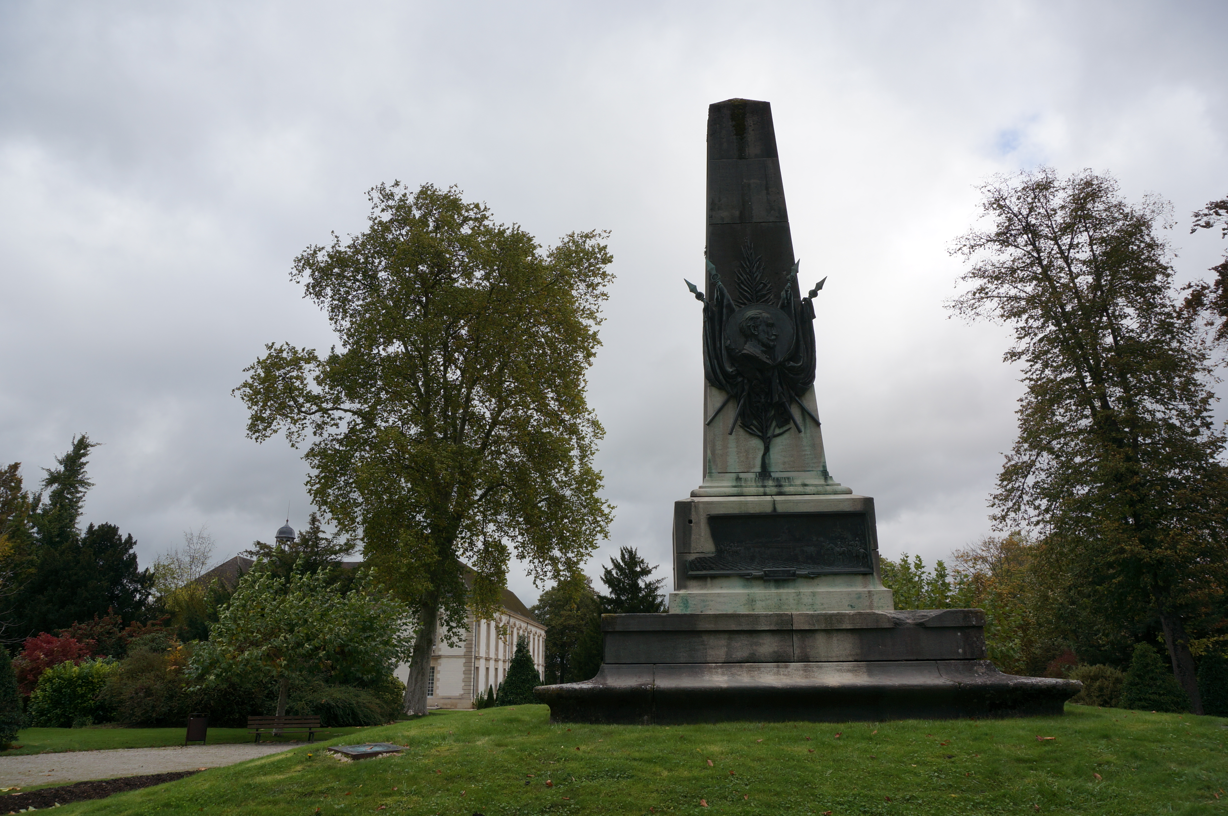 Revue de Vitry, stèle à l'Armée et à Carnot.